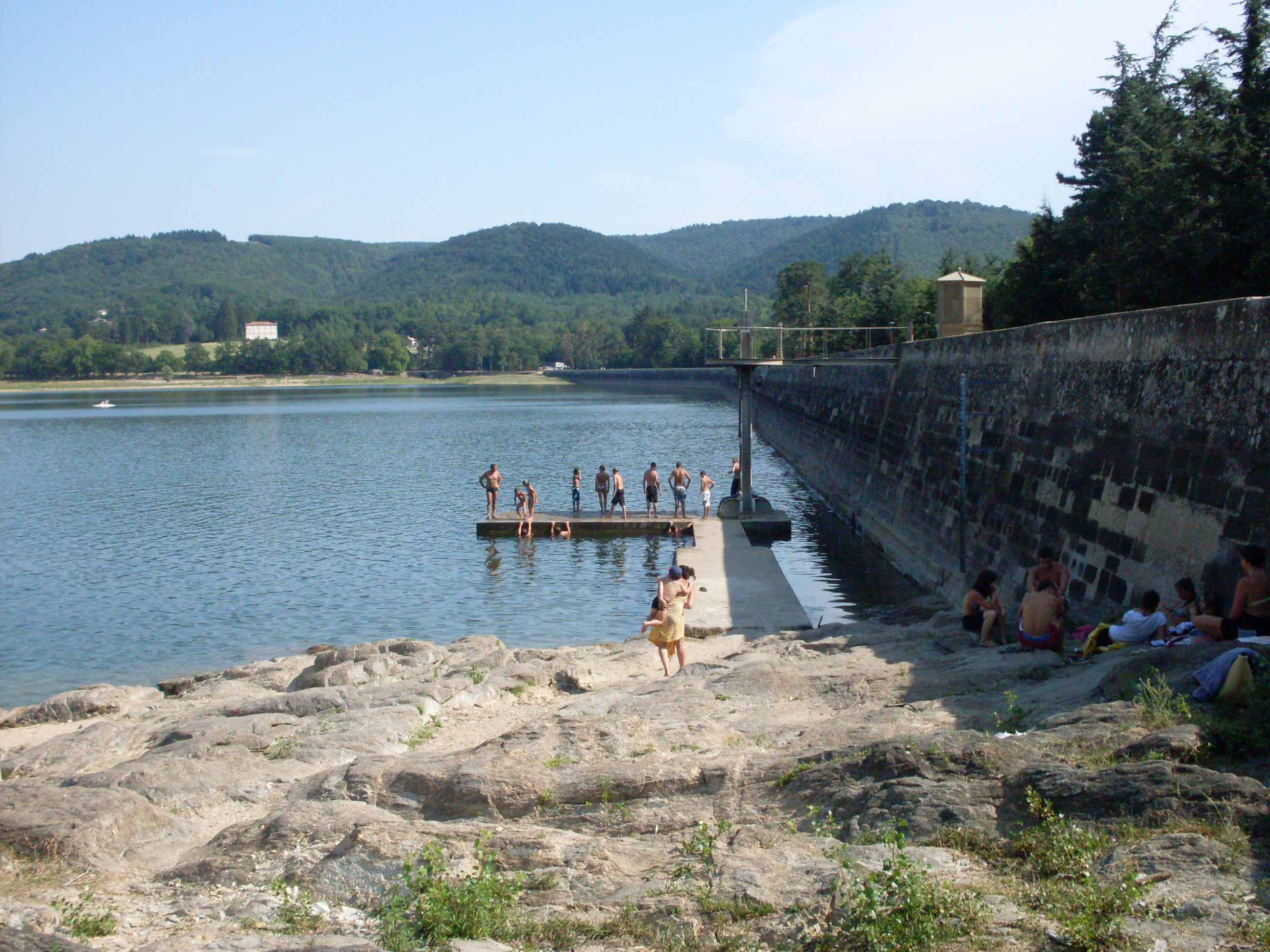 Lac Saint-Féréol